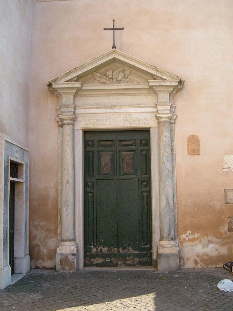 Oratorio del SS. Sacramento al Laterano, in piazza San Giovanni Laterano, a fianco della Scala Santa.